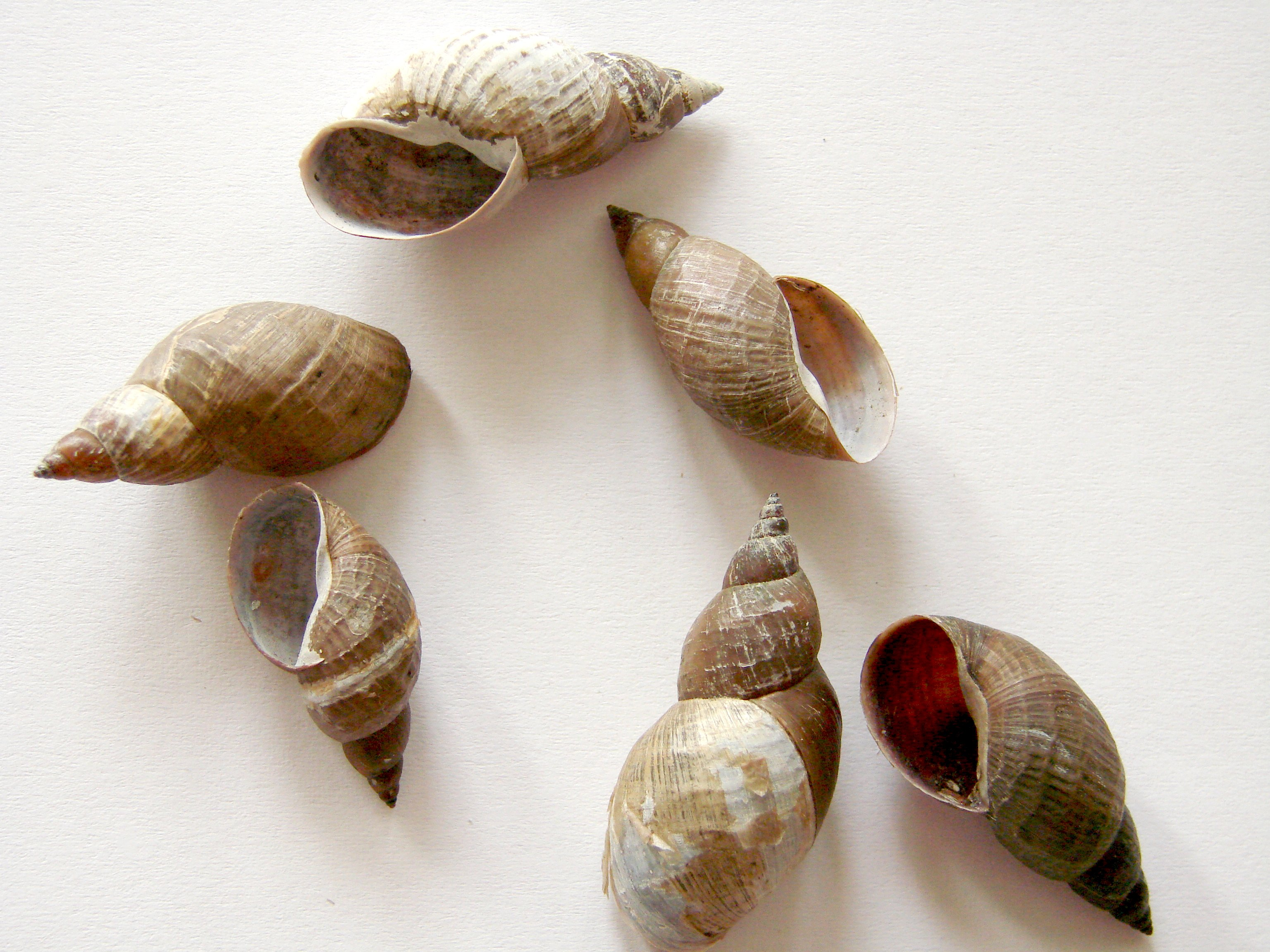 Lymnaea corvus (Galba palustris v. corvus)